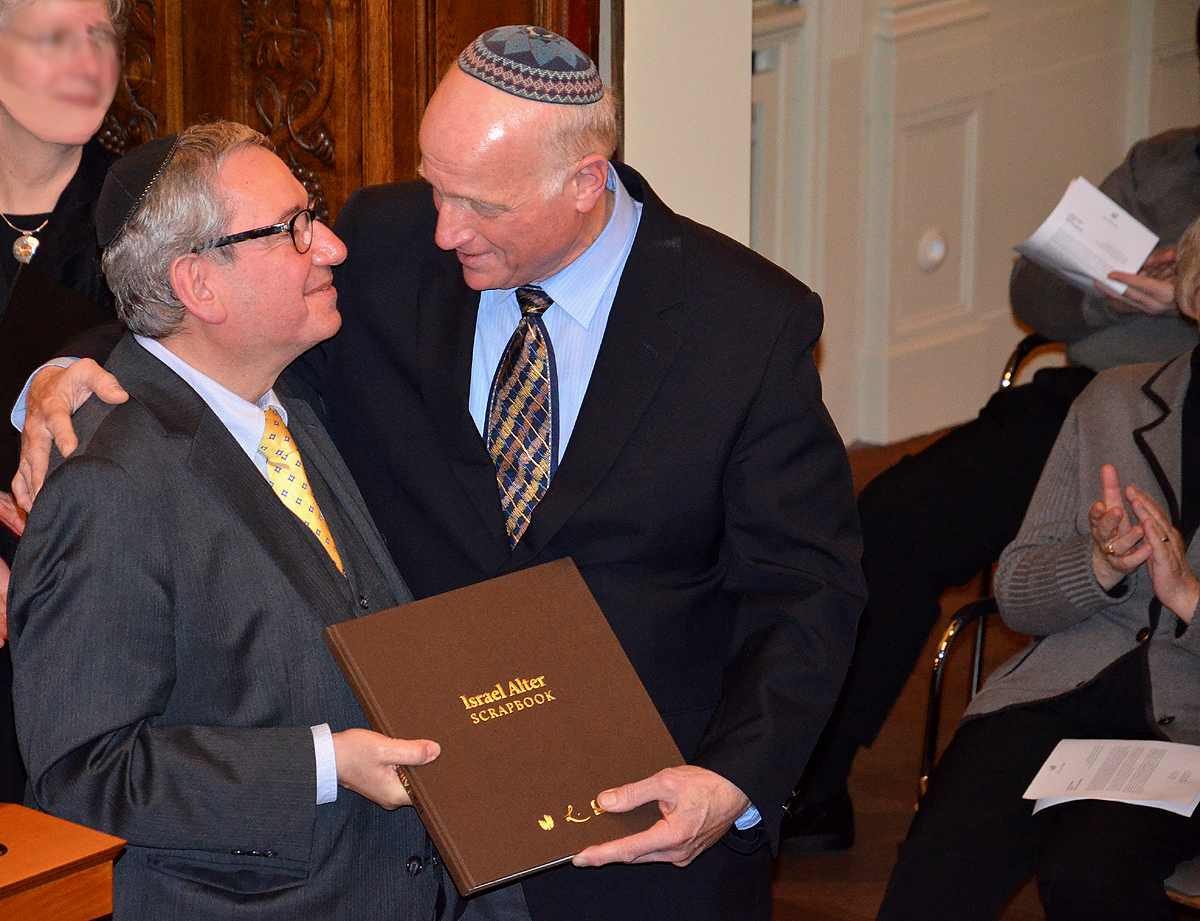 Zwei Freunde in der Villa Seligmann: Professor Andor Izsák überreicht Benjamin Z. Maissner, dem Kantor und Musikprofessor am Holy Blossom Temple in Toronto und Neffen von Israel Alter, das Faksimile des Buches Scrapbook. In diesem "Tagebuch" des letzten Oberkantors von Hannover sammelte Israel Alter zeitgenössische Kritiken in deutscher, englischer und hebräischer Sprache, Fotos, Konzertprogramme und andere Dokumente aus seinem musikalischen Leben. Der Druck des Faksimiles (ISBN 978-3-487-15073-4) wurde unter anderem gefördert durch die Gottfried Wilhelm Leibniz Bibliothek - Niedersächsische Landesbibliothek ...